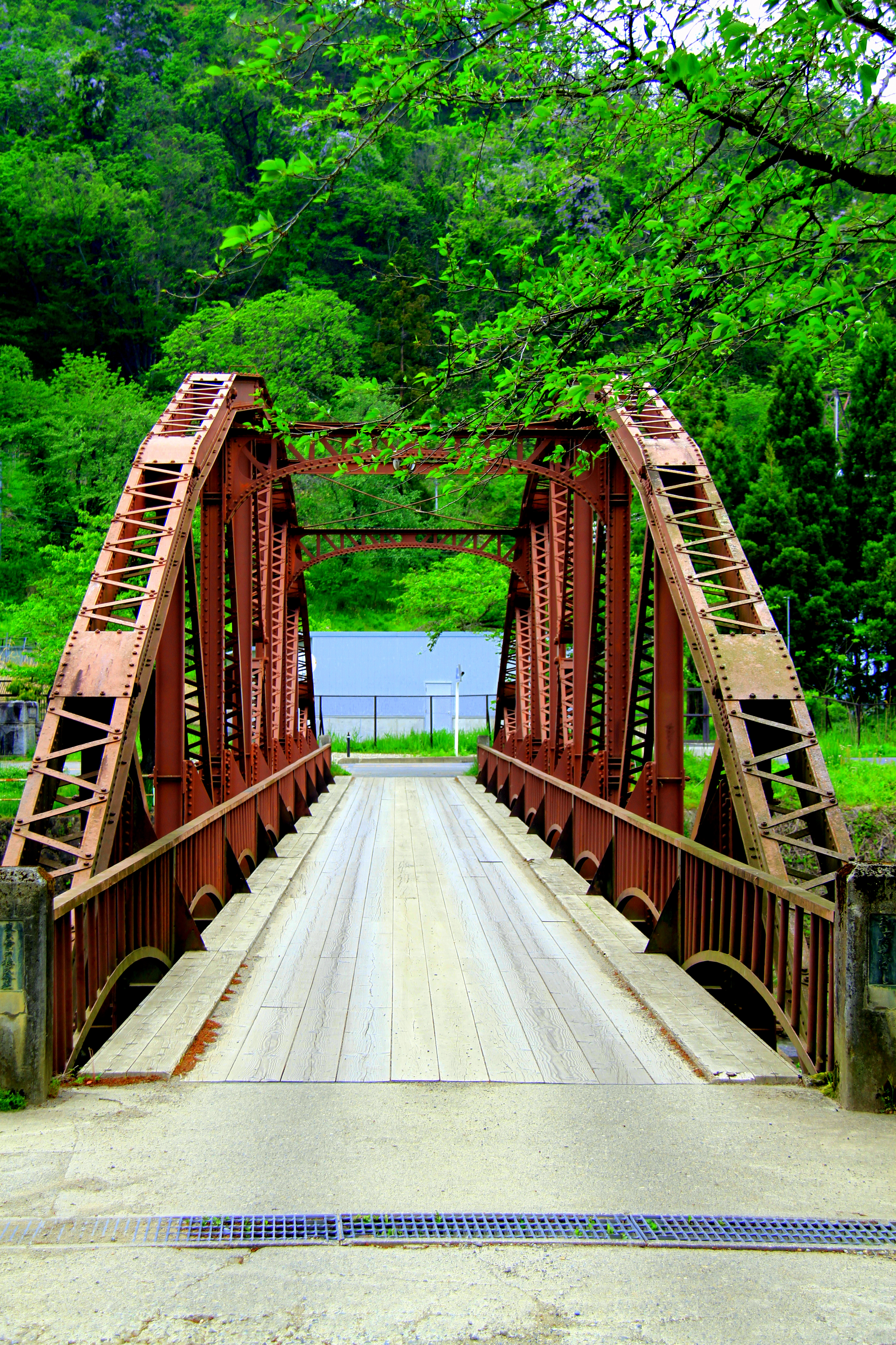 切立橋 (きったてばし)。福島県会 (あい)津 (づ)若松 (わかまつ)市河 (かわ)東 (ひがし)町 (まち)。日橋川 (にっぱしがわ)の左岸から北北東の方向を見る。